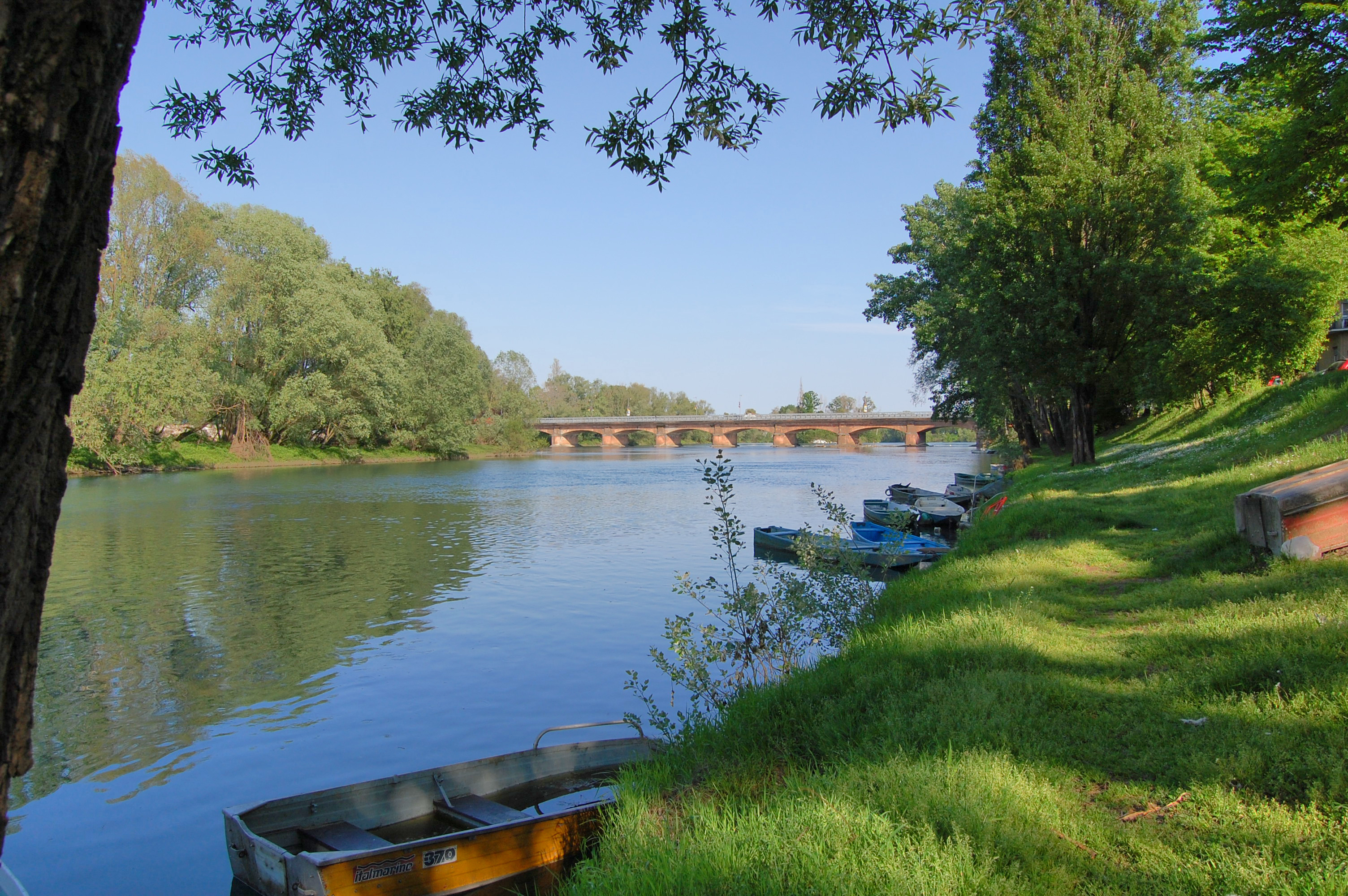 Veduta del Ponte di Lodi dalla Piarda Ferrari